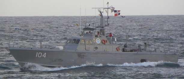 guardacostas de la marina de guerra